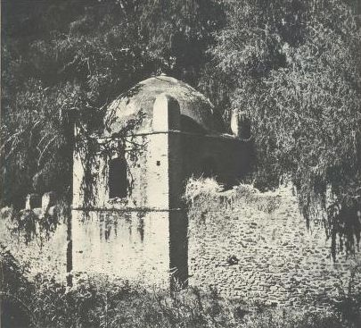 Kuskwam בית מגוריו של אב המנזר